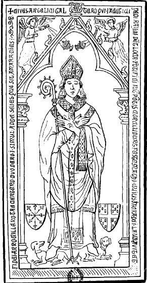 Gautier de Ray, évêque de Négrepont (1313), parfois considéré à tort comme un abbé de Bèze (Jules Gauthier, « Othon de la Roche, conquérant d'Athènes et sa famille » in Procès-verbaux et mémoires - Académie des Sciences, Belles Lettres et Arts de Besançon, 1880, p. 149-152)